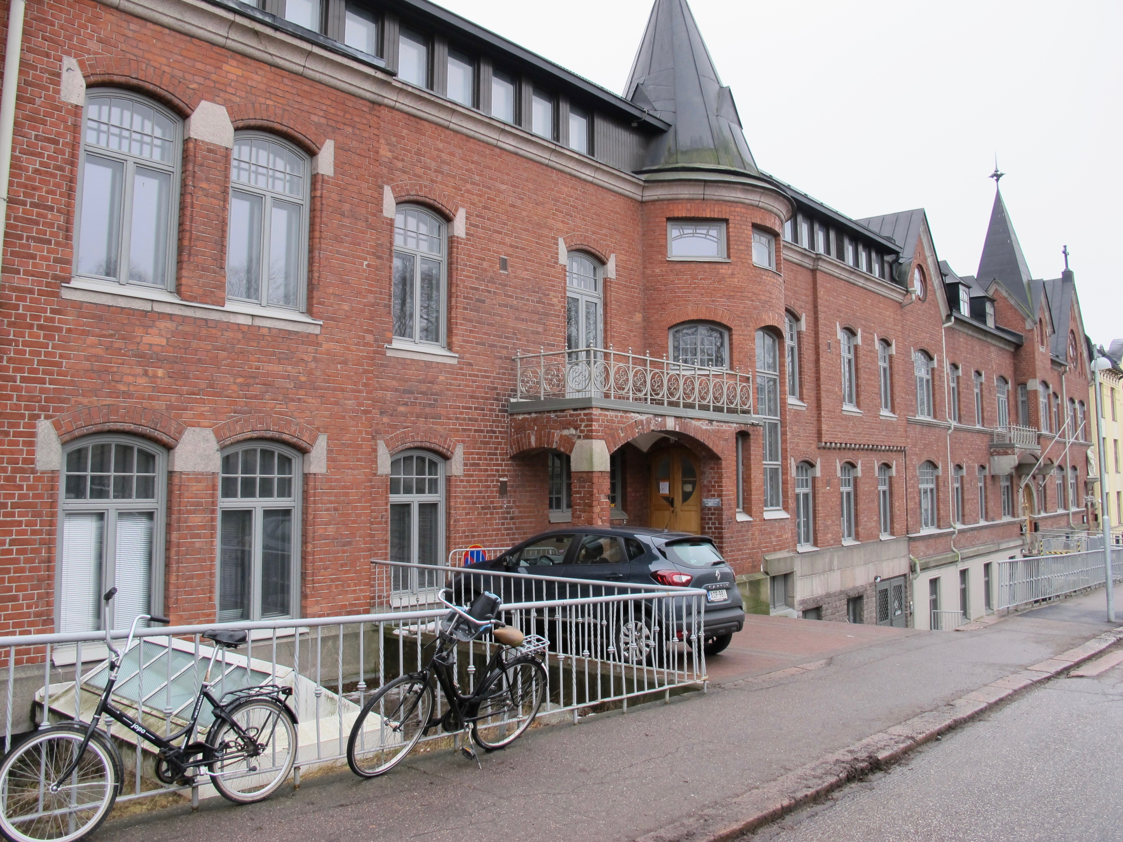 Suomen lähetysseuran toimitalo Lähetystalo Tähtitorninkadulla, Helsingissä 27. tammikuuta 2018.